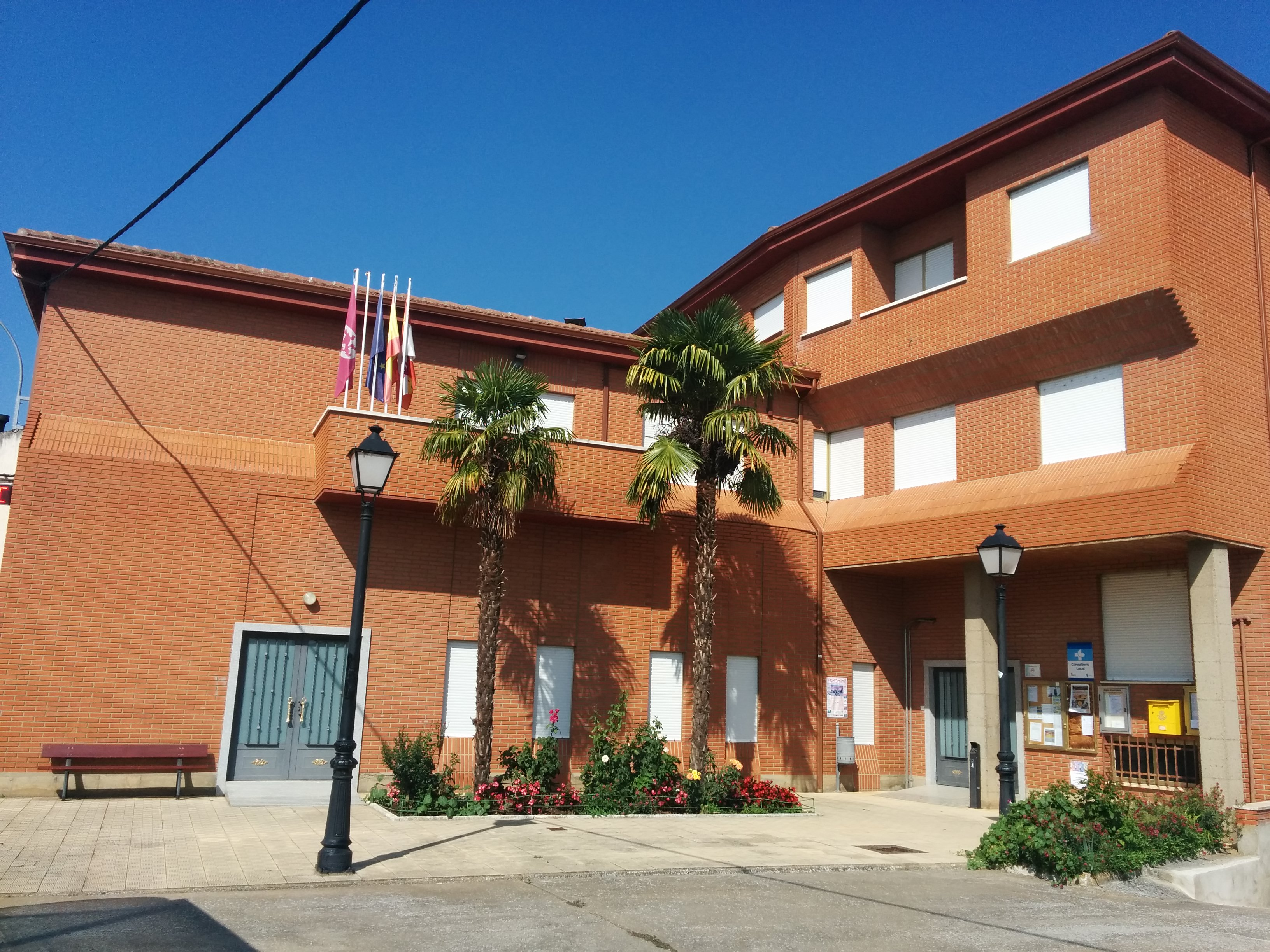 Casa consistorial de Valdefuentes del Páramo